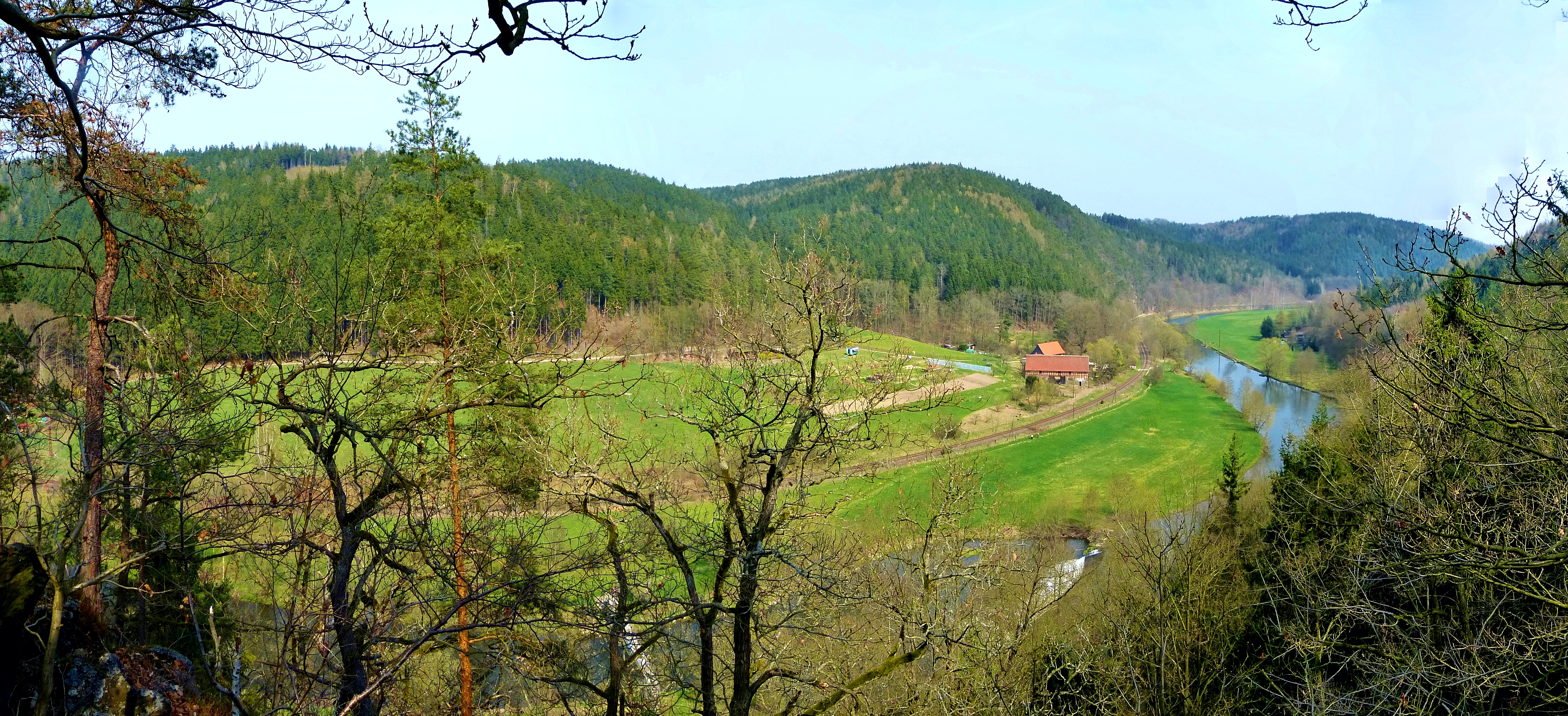 Das Elstertal bei Berga/Elster. Blick von der Clodramühle zum Unterhammer.